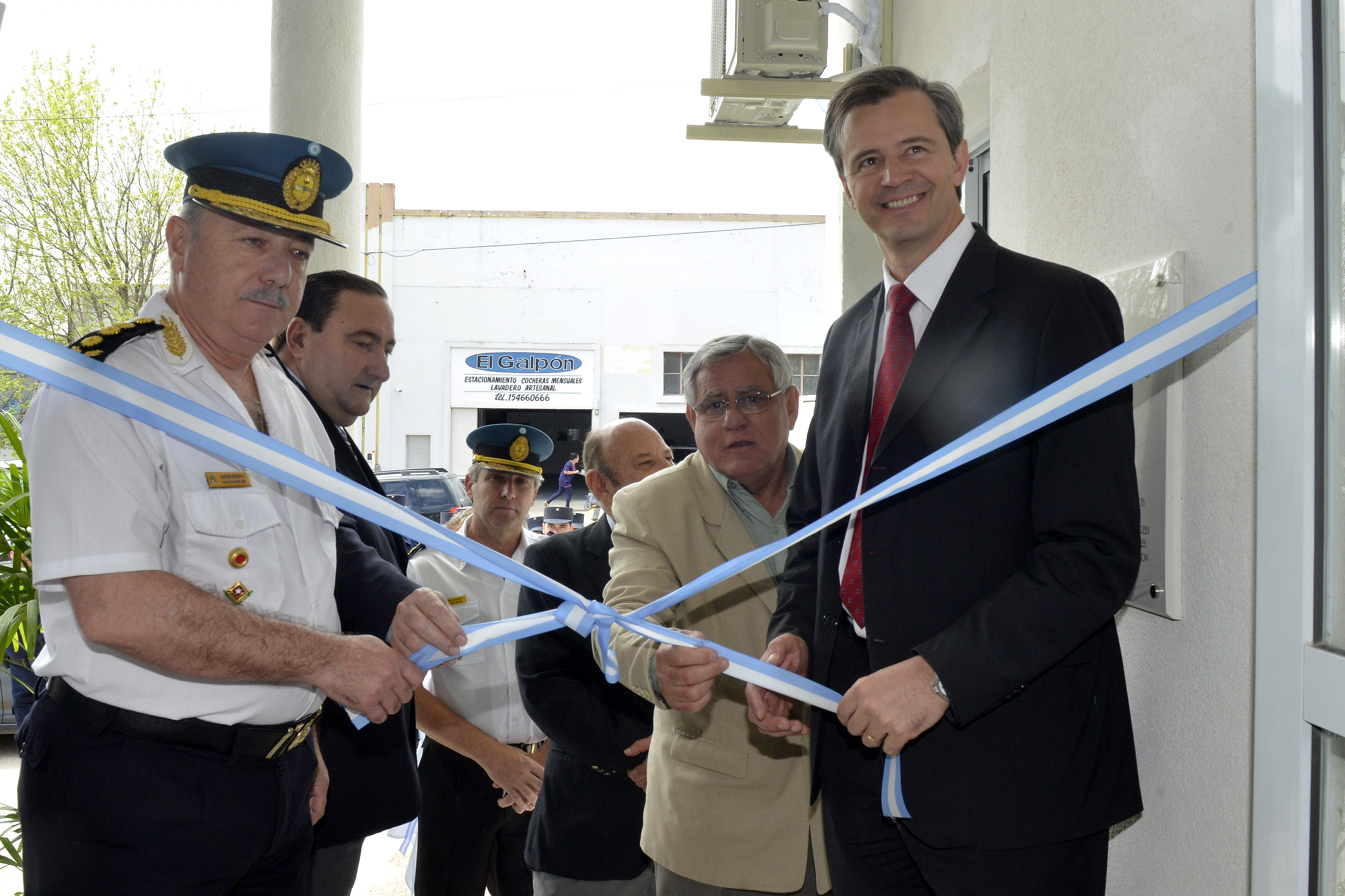 El ministro de Gobierno y Justicia de Entre Ríos, Adán Humberto Bahl, encabezó la inauguración del edificio donde funcionará la Sección Patrulla de la División 911 ubicado en Avenida Ramírez y Gualeguaychú de Paraná.